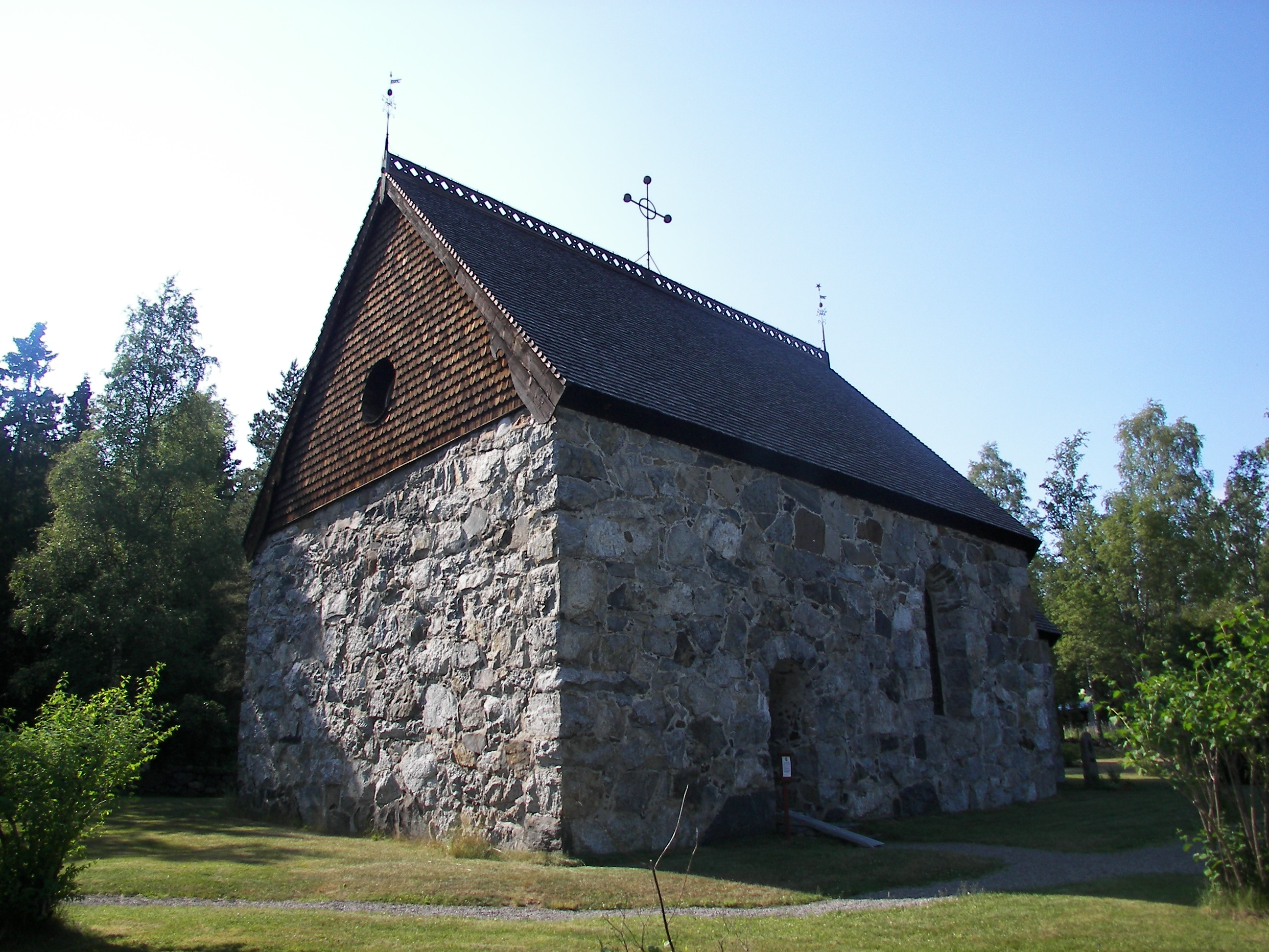 Murbergskyrkan